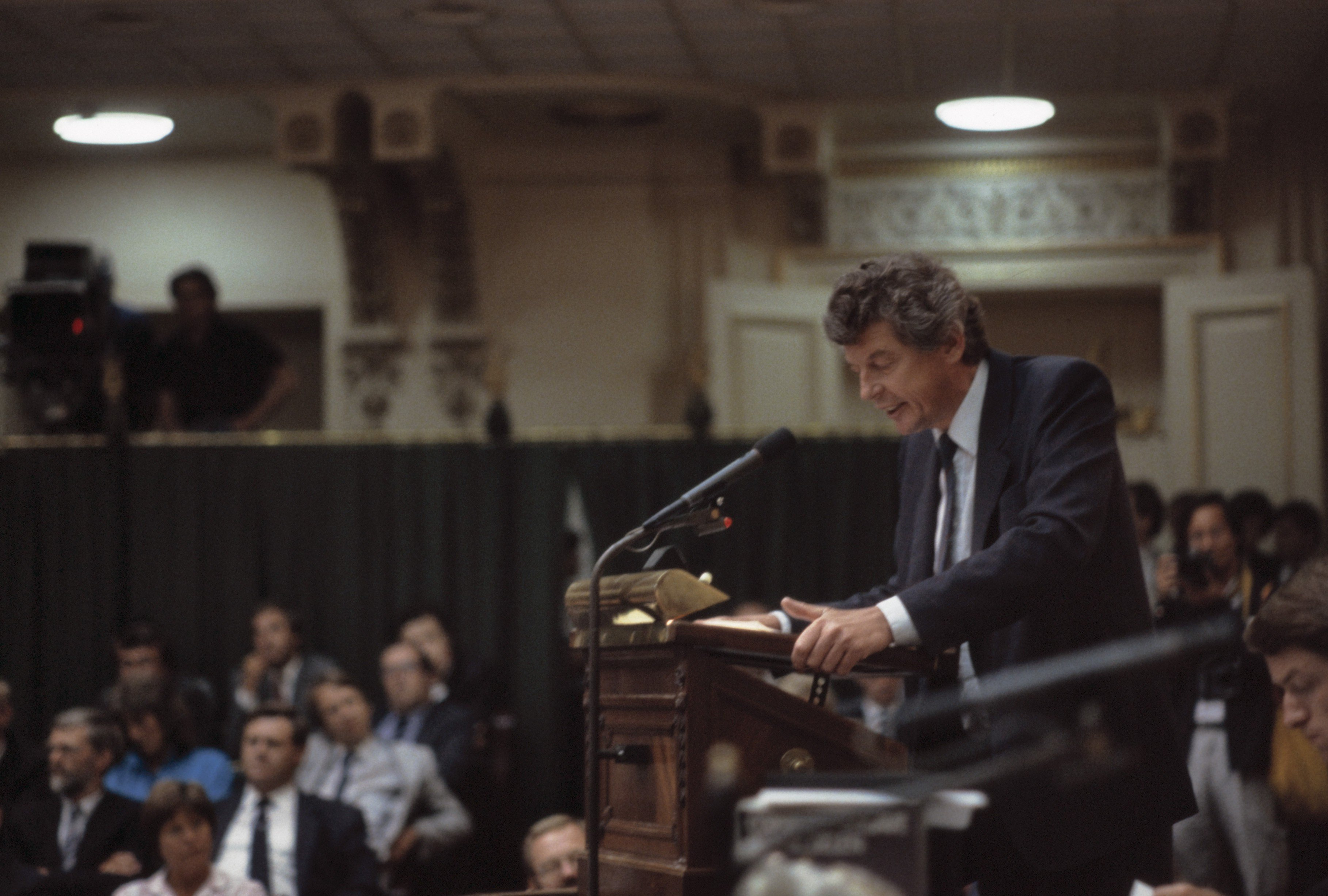 Collectie / Archief : Fotocollectie Anefo Reportage / Serie : [ onbekend ] Beschrijving : Regeringsverklaring Kabinet Lubbers II ; Wim Kok (PvdA aan het woord Datum : 30 juli 1986 Trefwoorden : kabinetten, politiek Persoonsnaam : Kok, Wim Fotograaf : Croes, Rob C. / Anefo Auteursrechthebbende : Nationaal Archief Materiaalsoort : Dia (kleur) Nummer archiefinventaris : bekijk toegang 2.24.01.06 Bestanddeelnummer : 253-8973